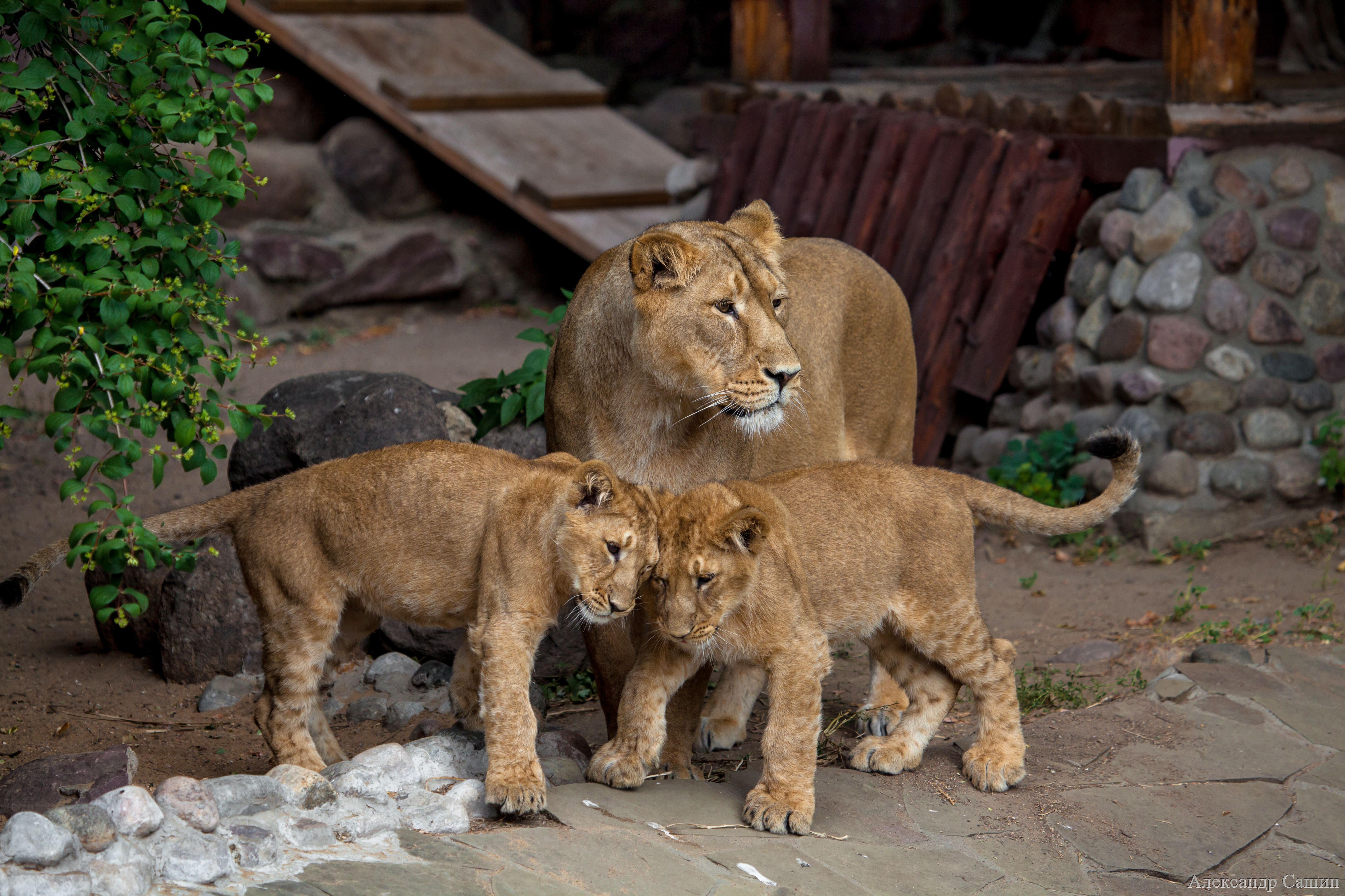 Львица с двумя львятами